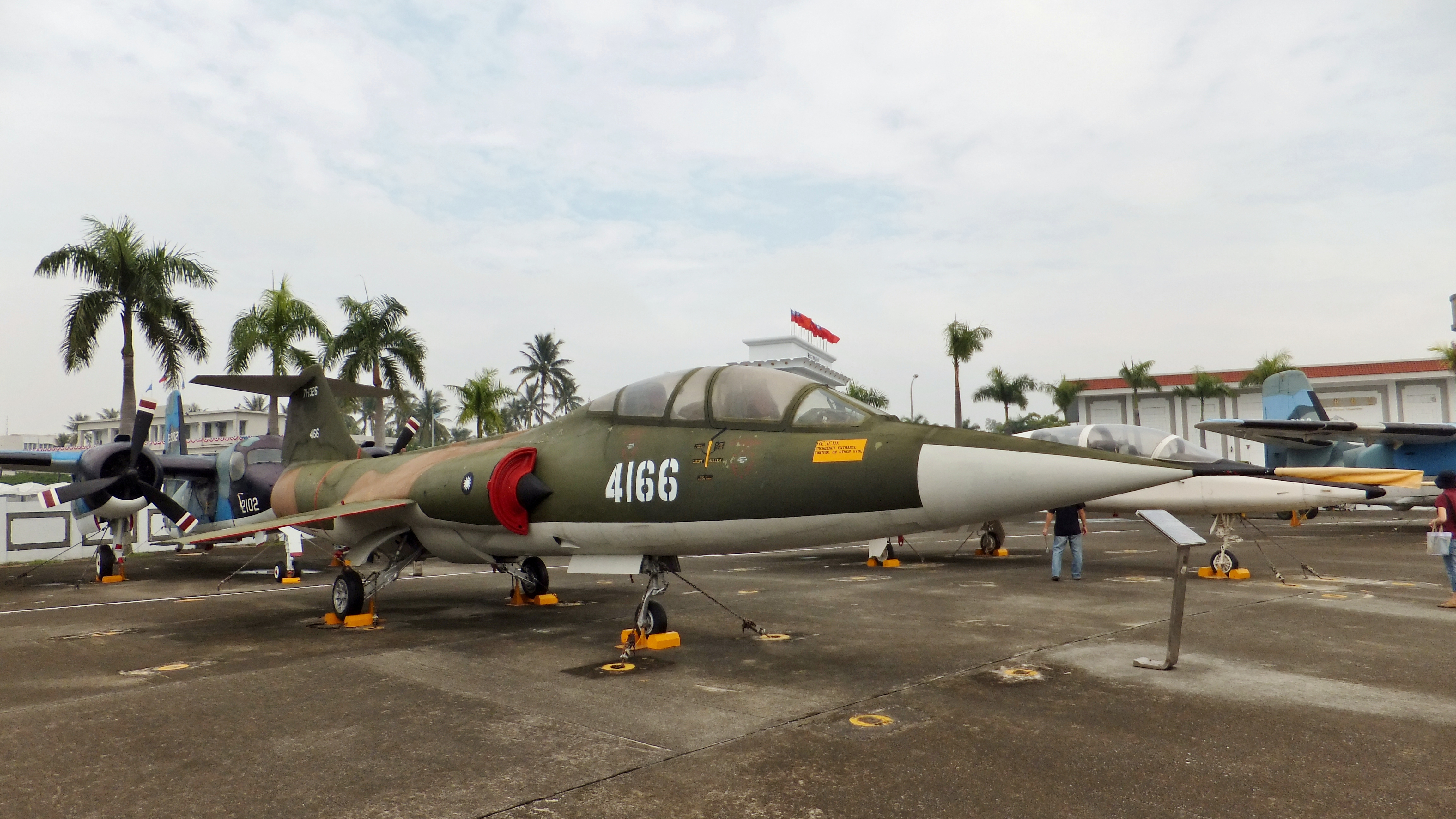 中華民國空軍F-104D 4166複座戰鬥教練機，本機自1975起自美國購入服役，1978年10月20日由周文沖與宋孝先駕駛，試降中山高速公路員林至花壇段戰備路段，至1986年除役，總飛行時間4951.5小時。其後保存於航空技術學校，1998年8月23日移交空軍軍史館展示。